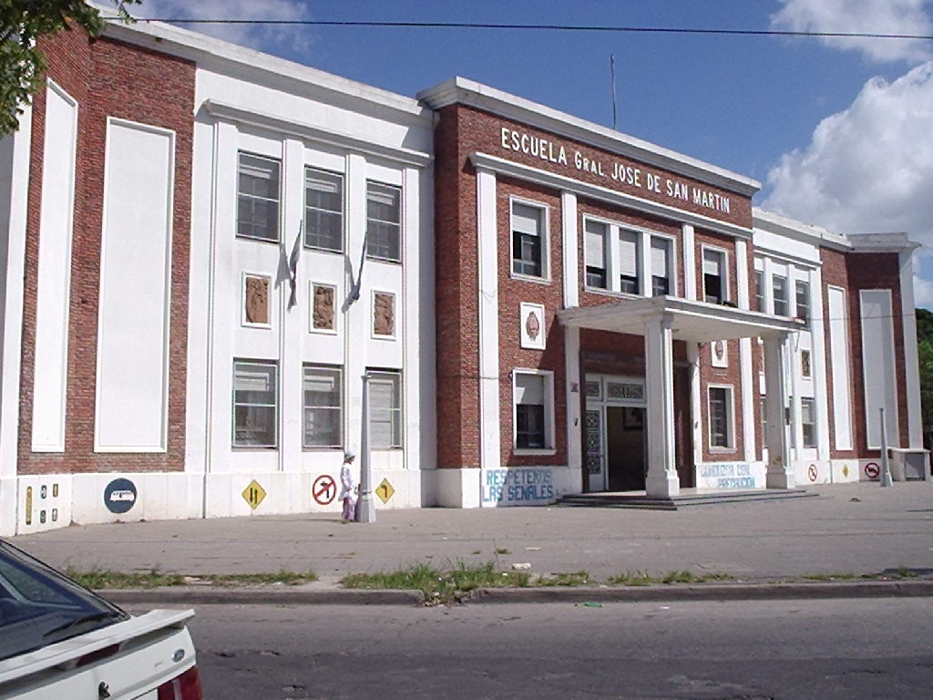 Fachada de la Escuela Nº 19 Gral. José de San Martìn